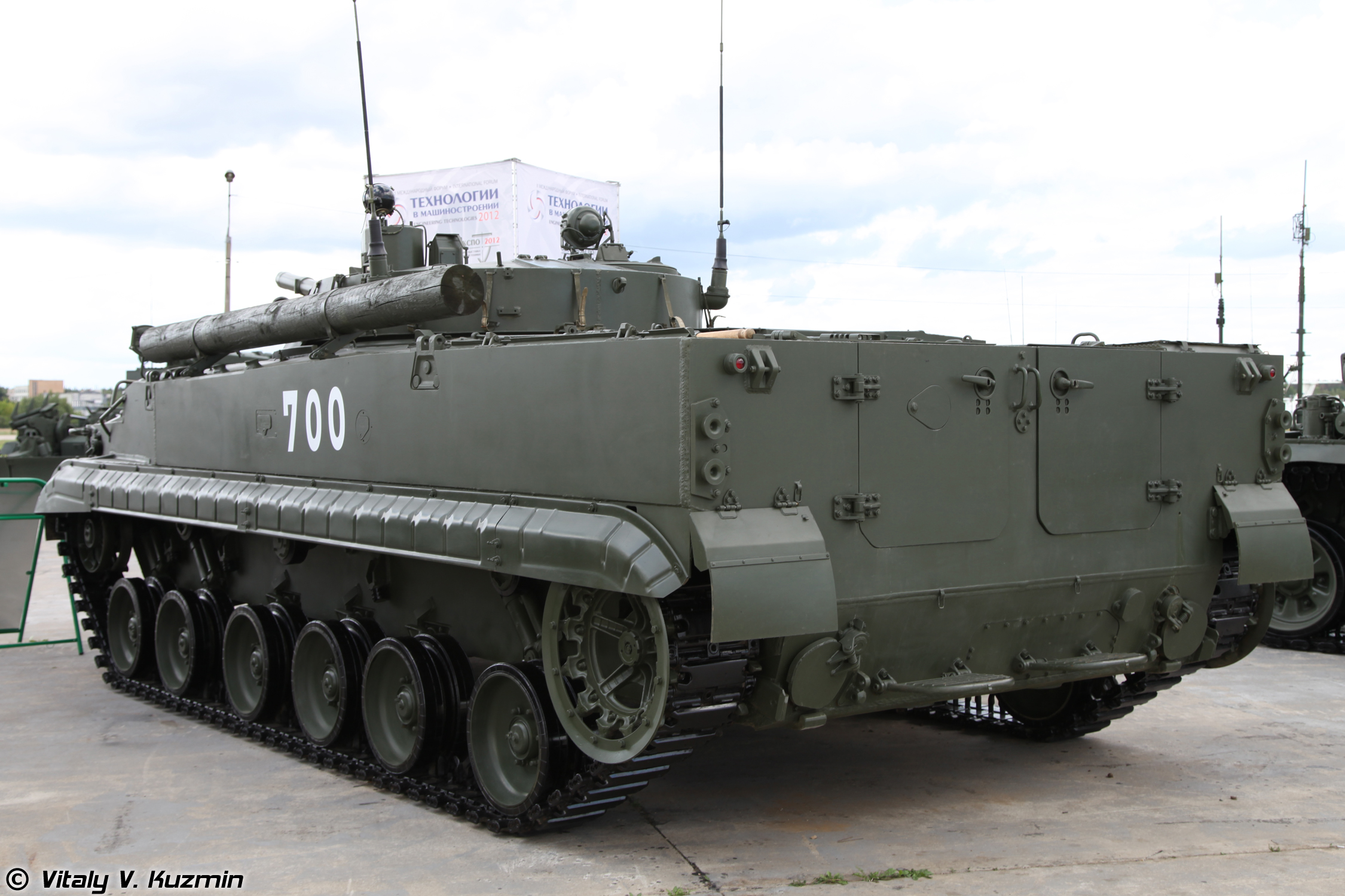 БМП-3 (BMP-3 IFV)